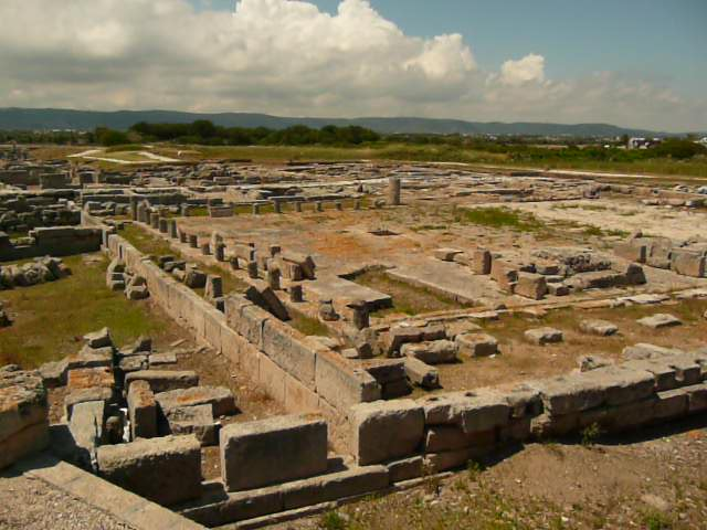 Parque arqueológico de Egnazia